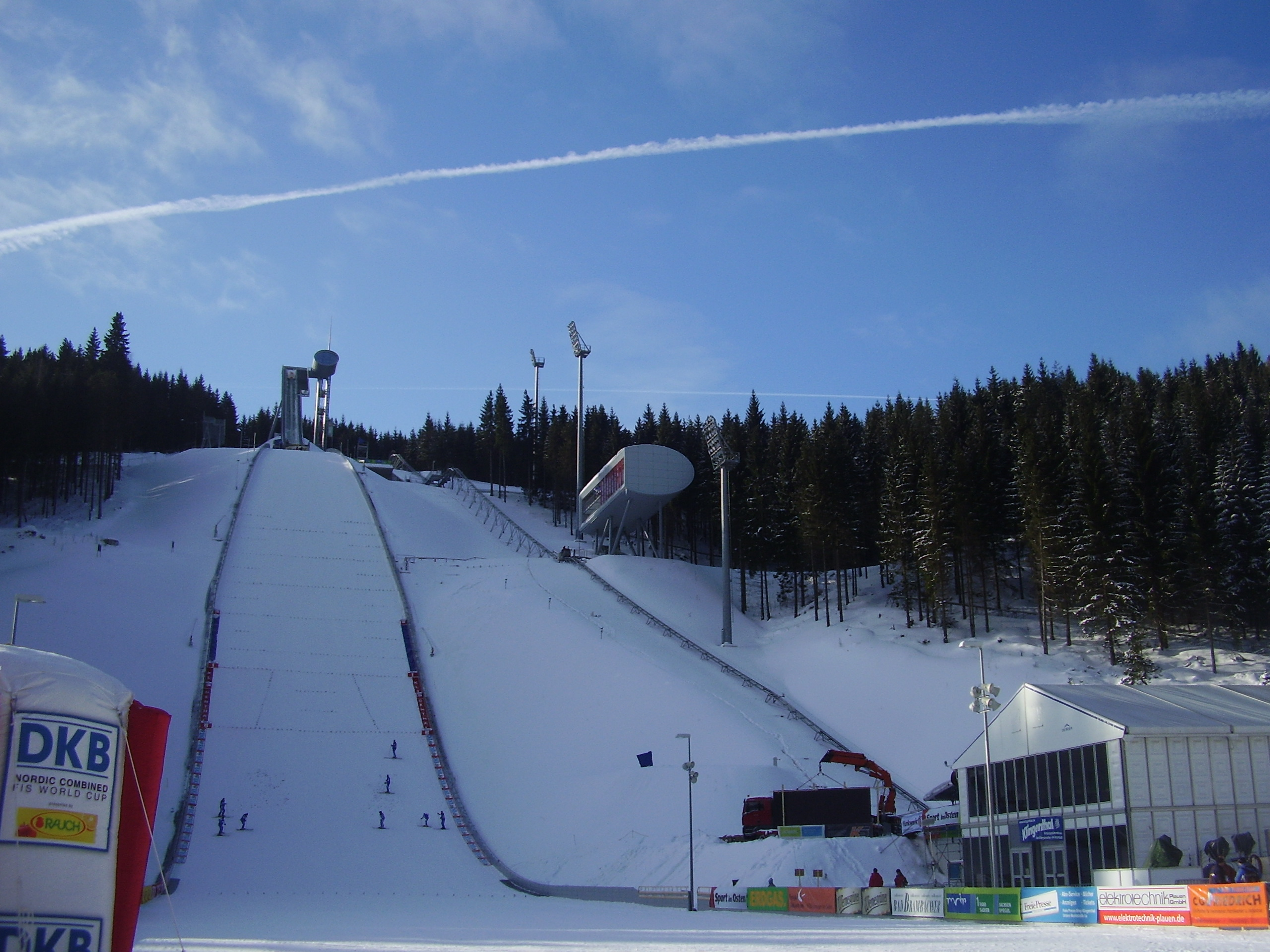 Die Vogtlandarena am 15.2.2009 zum Weltcup der Nordischen Kombination